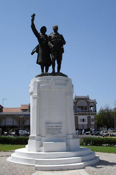 Monument à La gloire des troupes noires et aux créateurs disparus de l’AOF, à Dakar, Sénégal